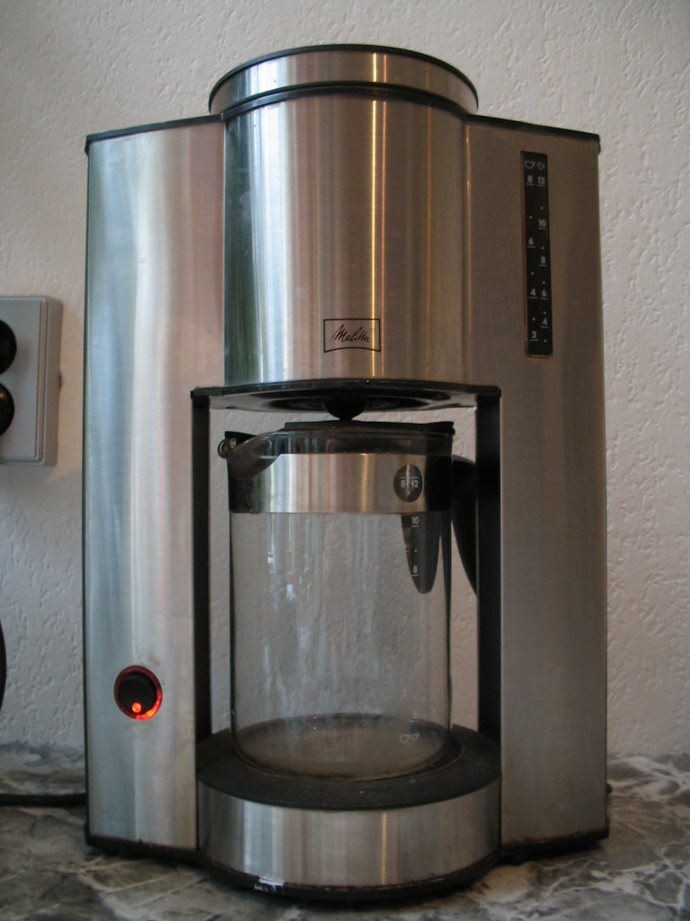 Omschrijving:, modern vormgegeven koffiezetapparaat Auteur:, Michiel1972 Licentie:, eigen werk, gfdl